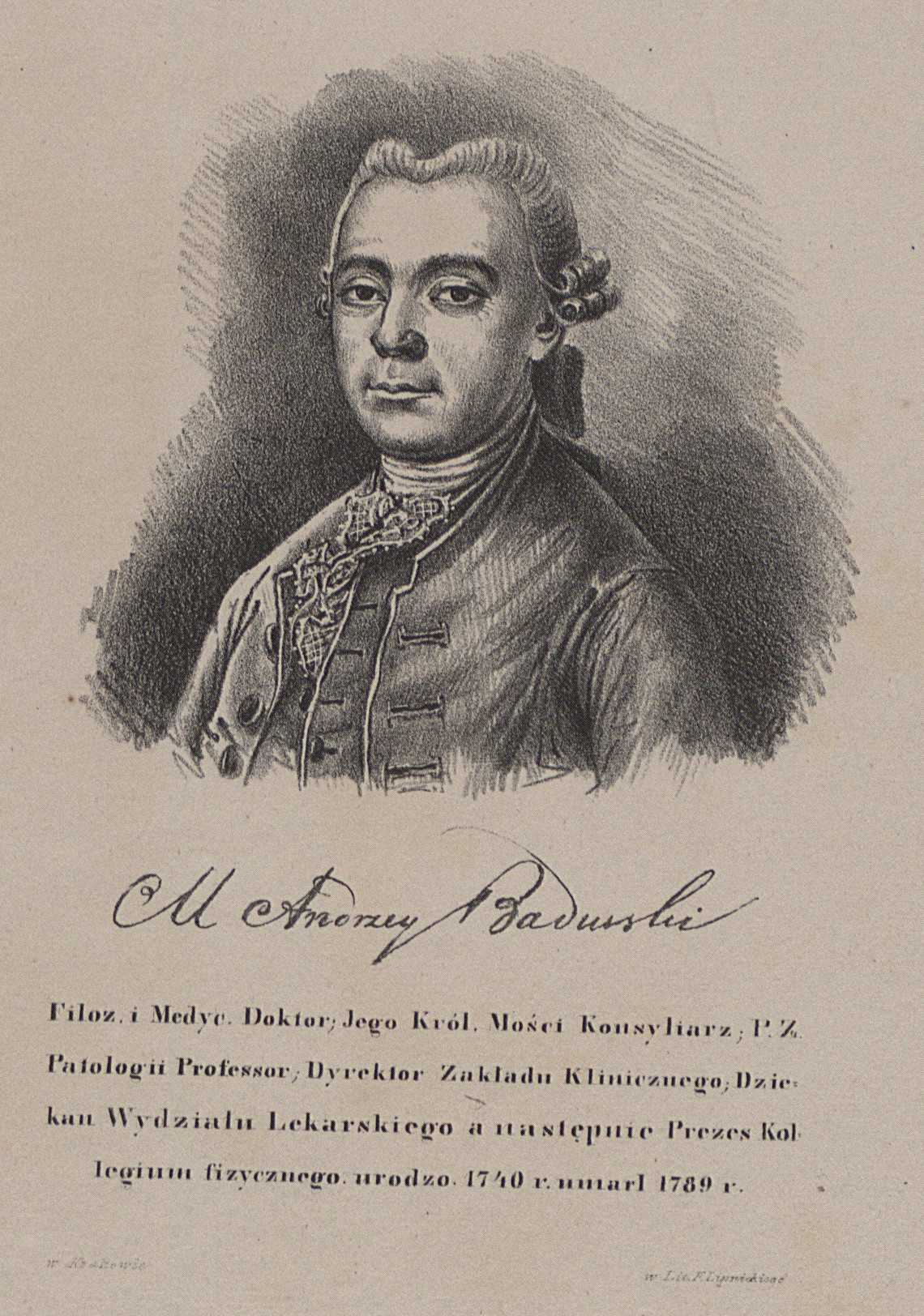 Andrzej Badurski